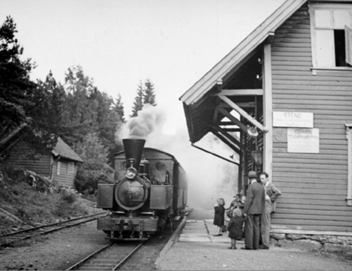 Stend stasjon